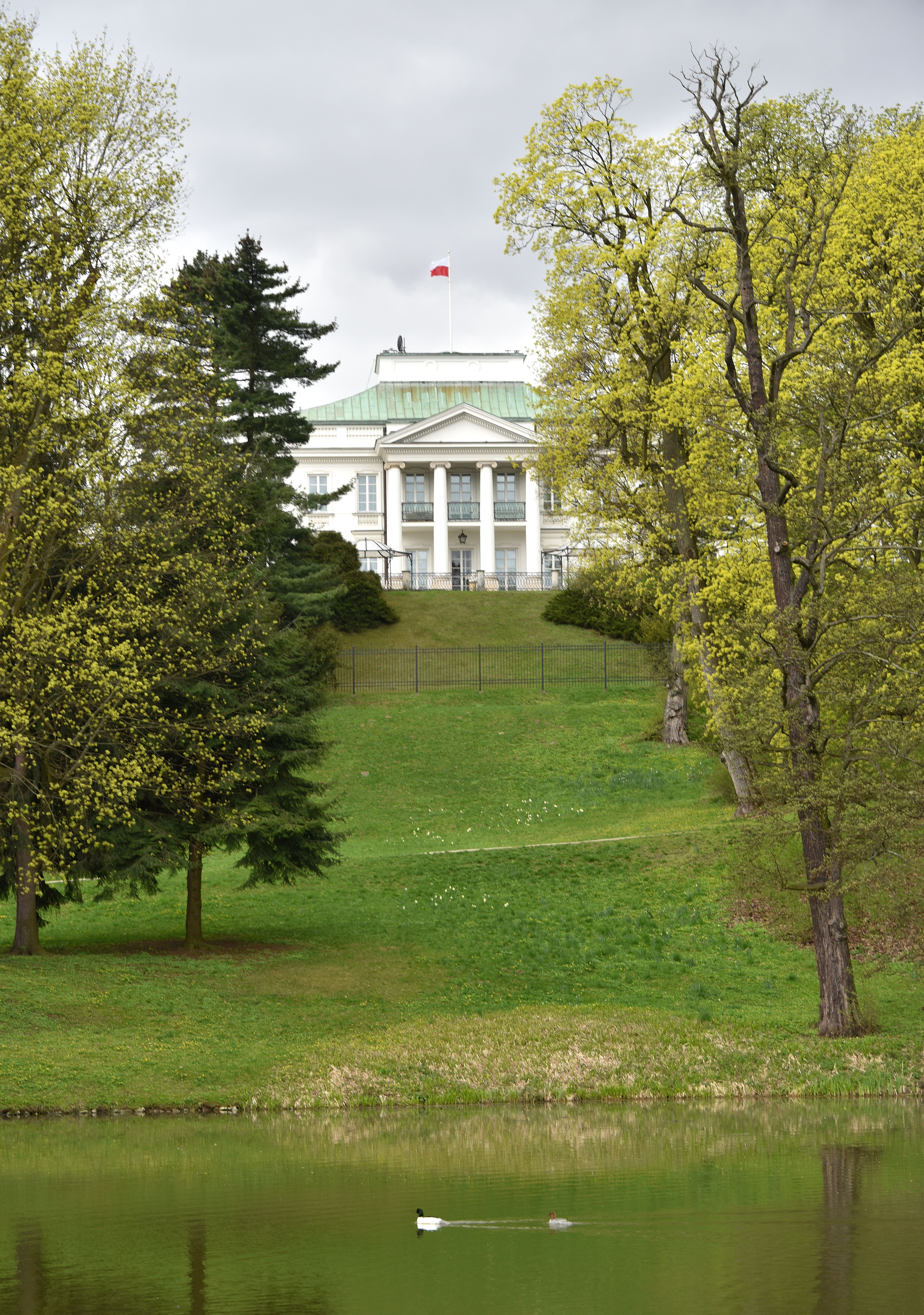 Belweder od strony Łazienek